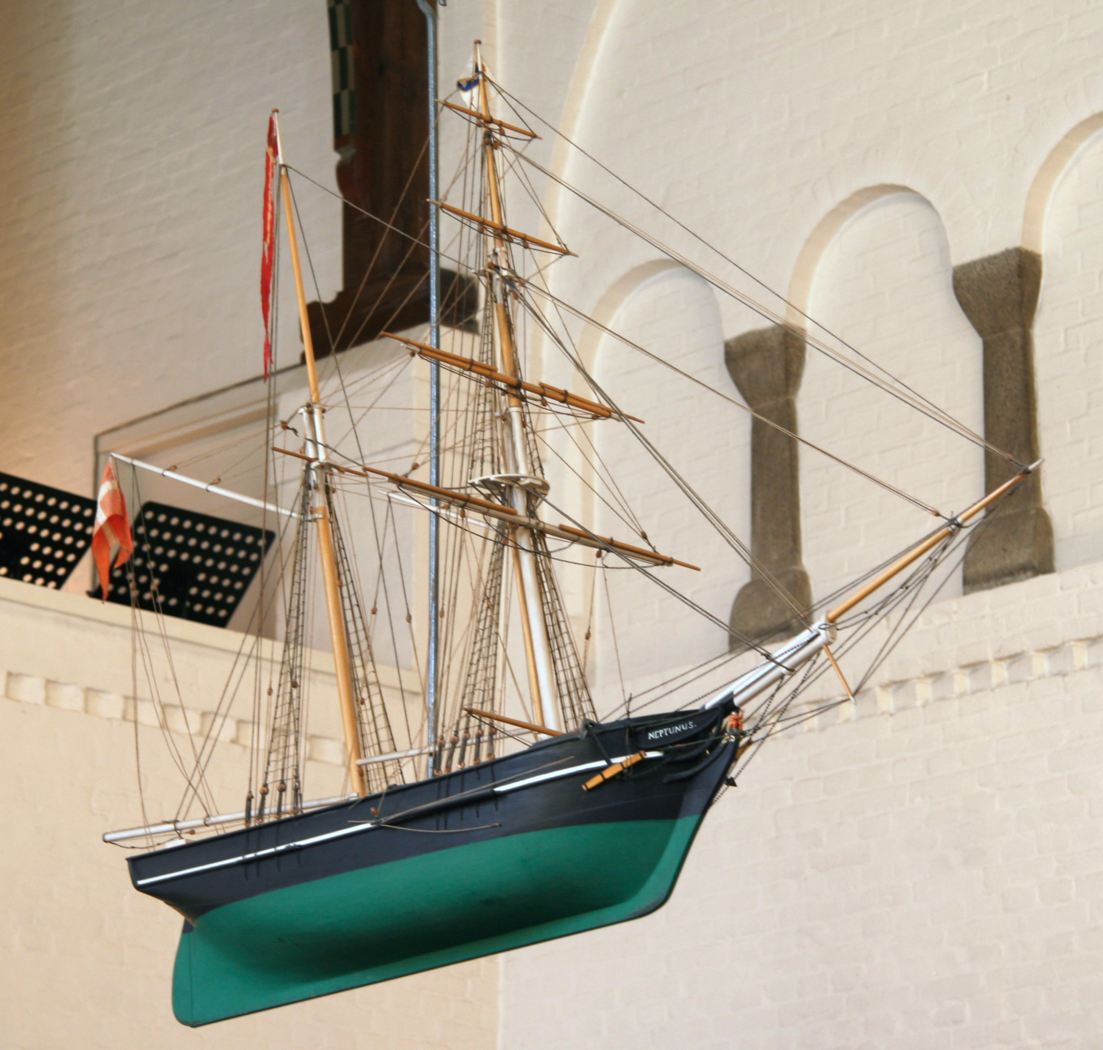 Davidskirken in Copenhagen, Denmark. Church ship.